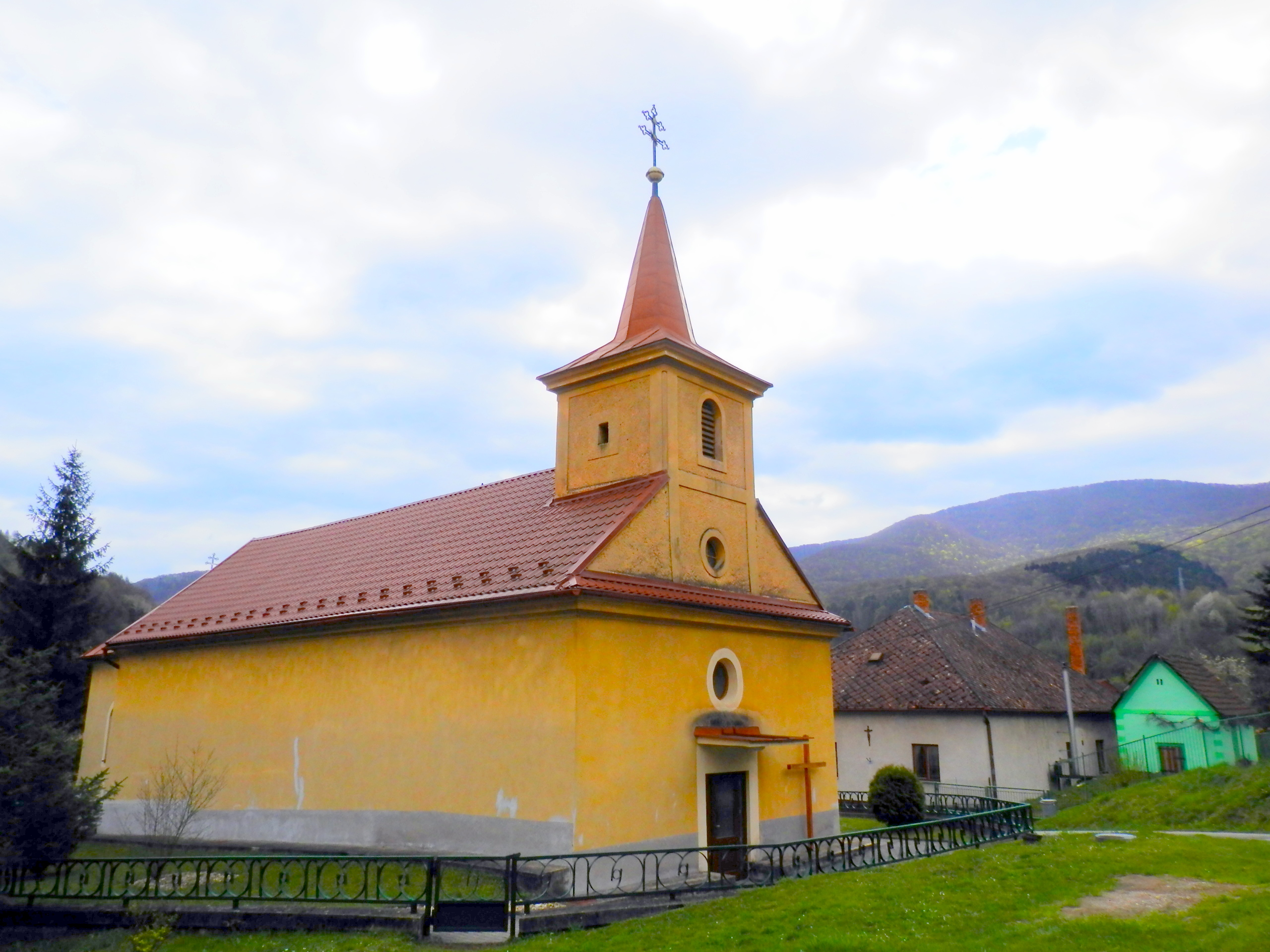 Kostol v obci Veľká Lodina, okres Košice okolie.